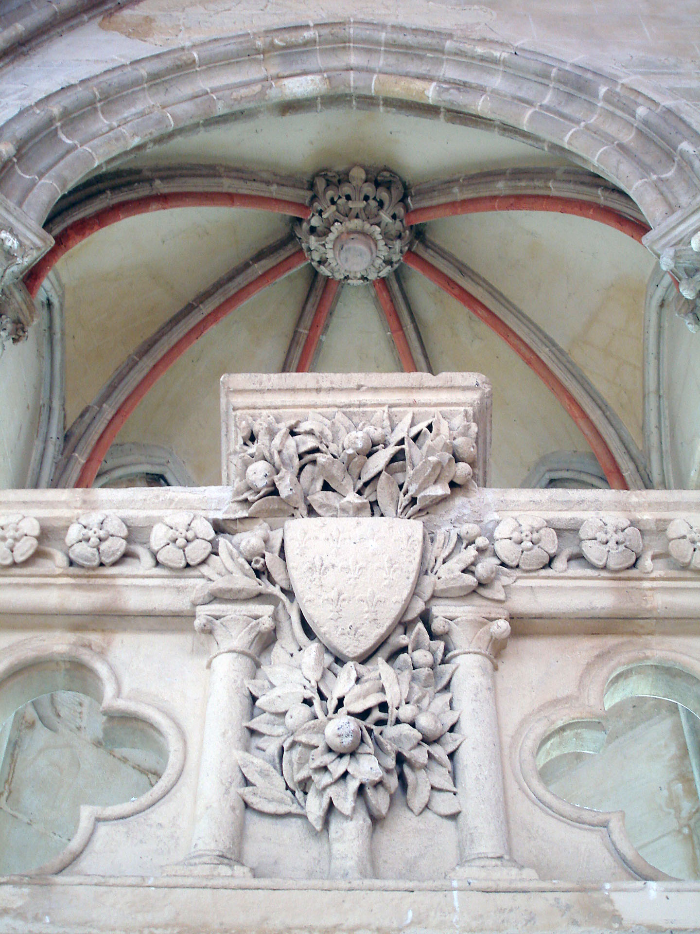 La chaire du lecteur dans le réfectoire des moines de l'abbaye de Royaumont, Val-d'Oise, France.